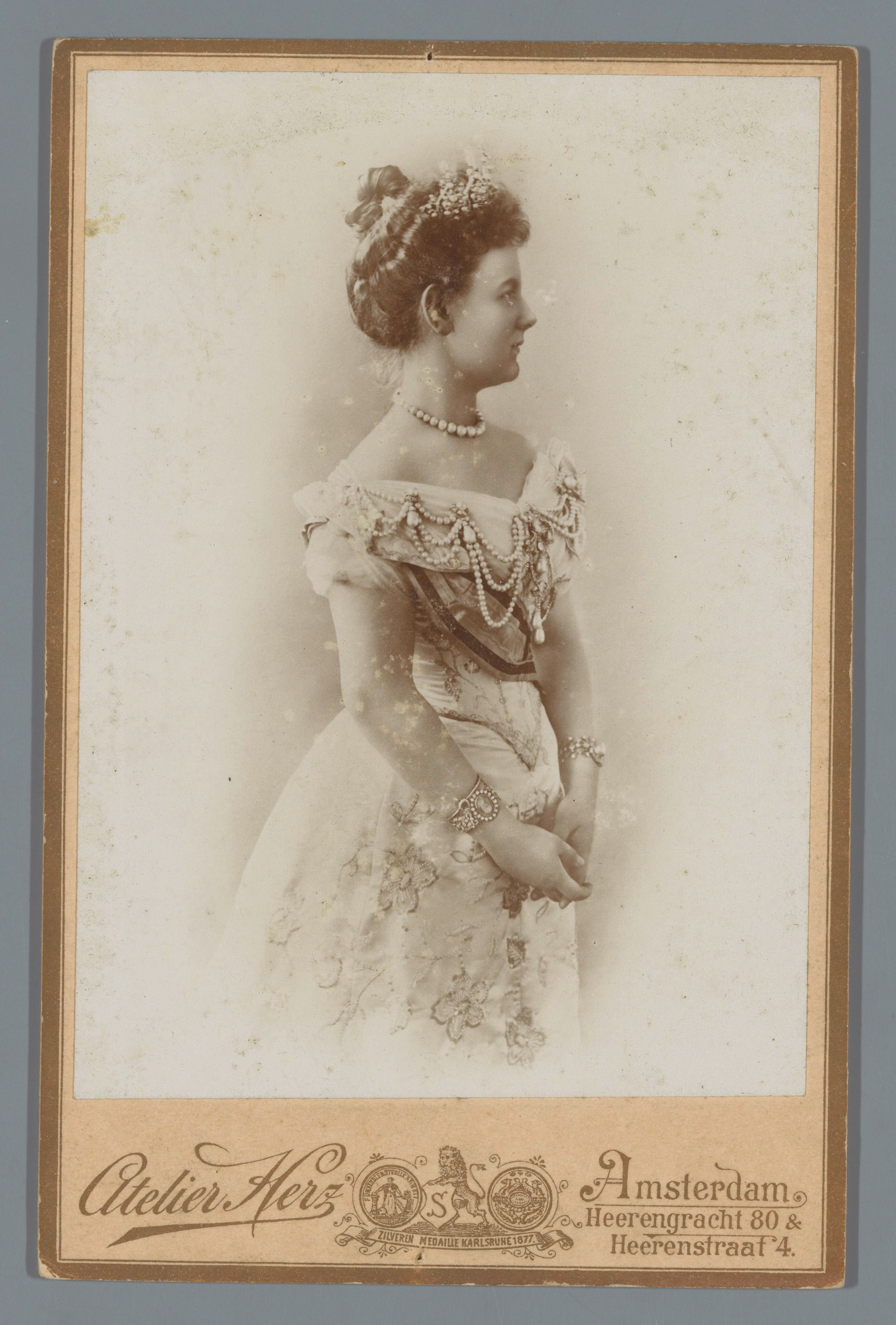 IdentificatieTitel(s): Portret van koningin WilhelminaObjecttype: foto kabinetfoto Objectnummer: RP-F-F21059Omschrijving: Portret van koningin Wilhelmina drie kwart, van rechtsVervaardigingVervaardiger: fotograaf: Atelier HerzDatering: dec-1900Materiaal: karton Techniek: fotografieAfmetingen: secundaire drager: h 165 mm × b 107 mmfoto: h 137 mm × b 98 mmOnderwerpWat: head-gear: capVerwerving en rechtenVerwerving: overdracht van beheer 1994Copyright: Publiek domein